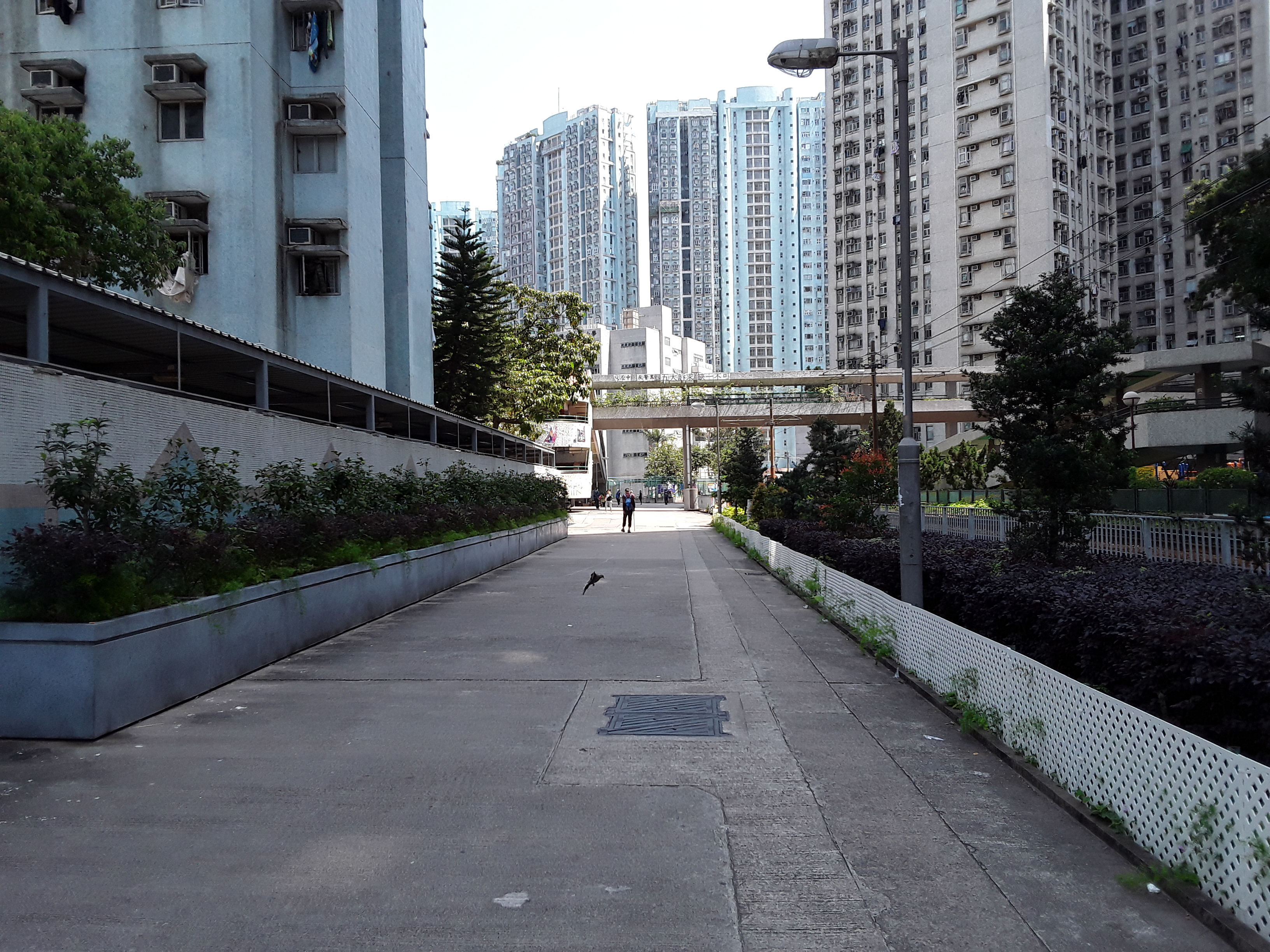 位於兆禧苑與悅湖山莊之間的通道以及兆禧輕鐵站對出的一段路軌